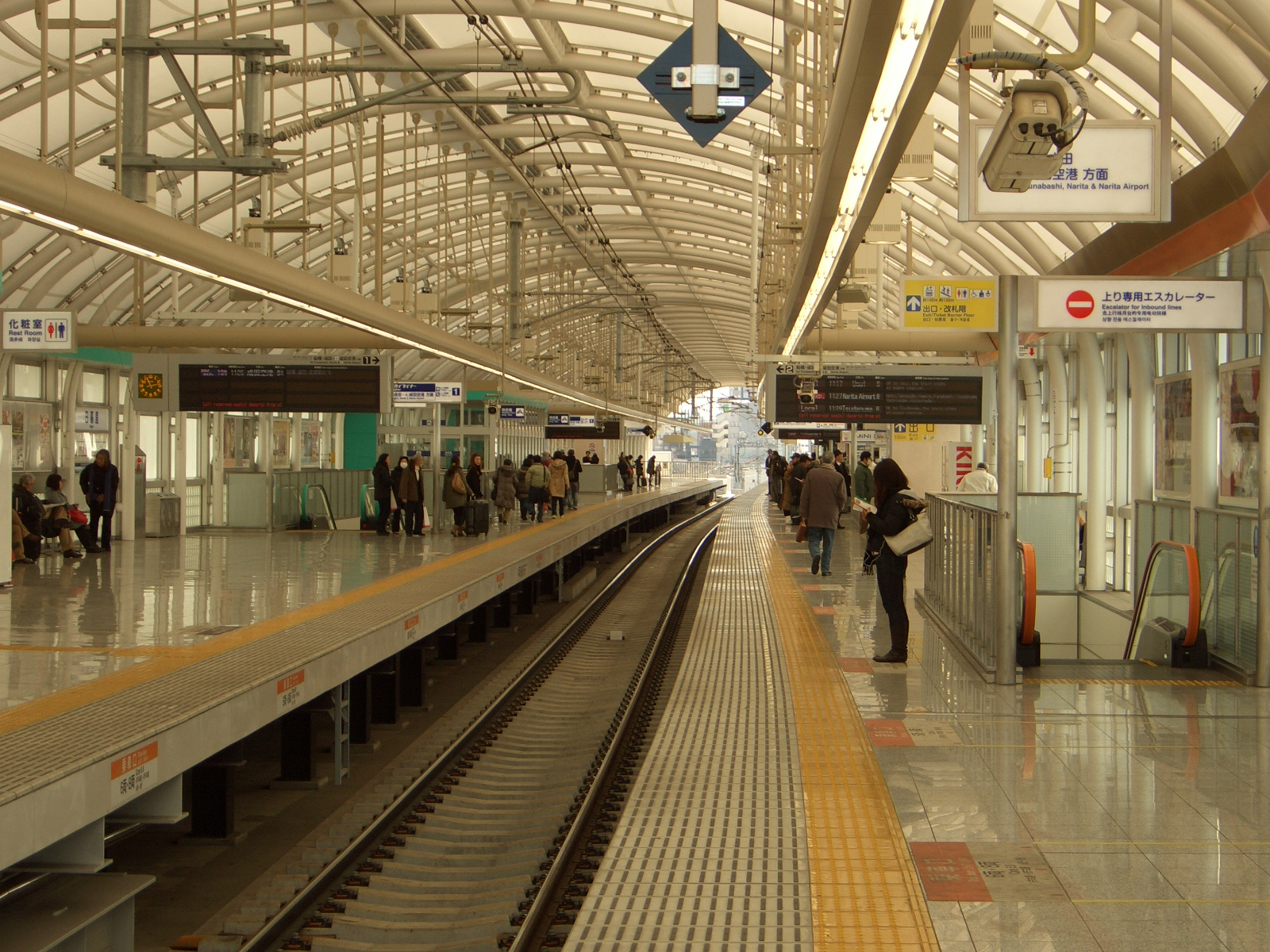 京成電鉄日暮里駅1番のりば及び2番のりば。2番のりば成田空港方端部より南東を望む。東京都荒川区。